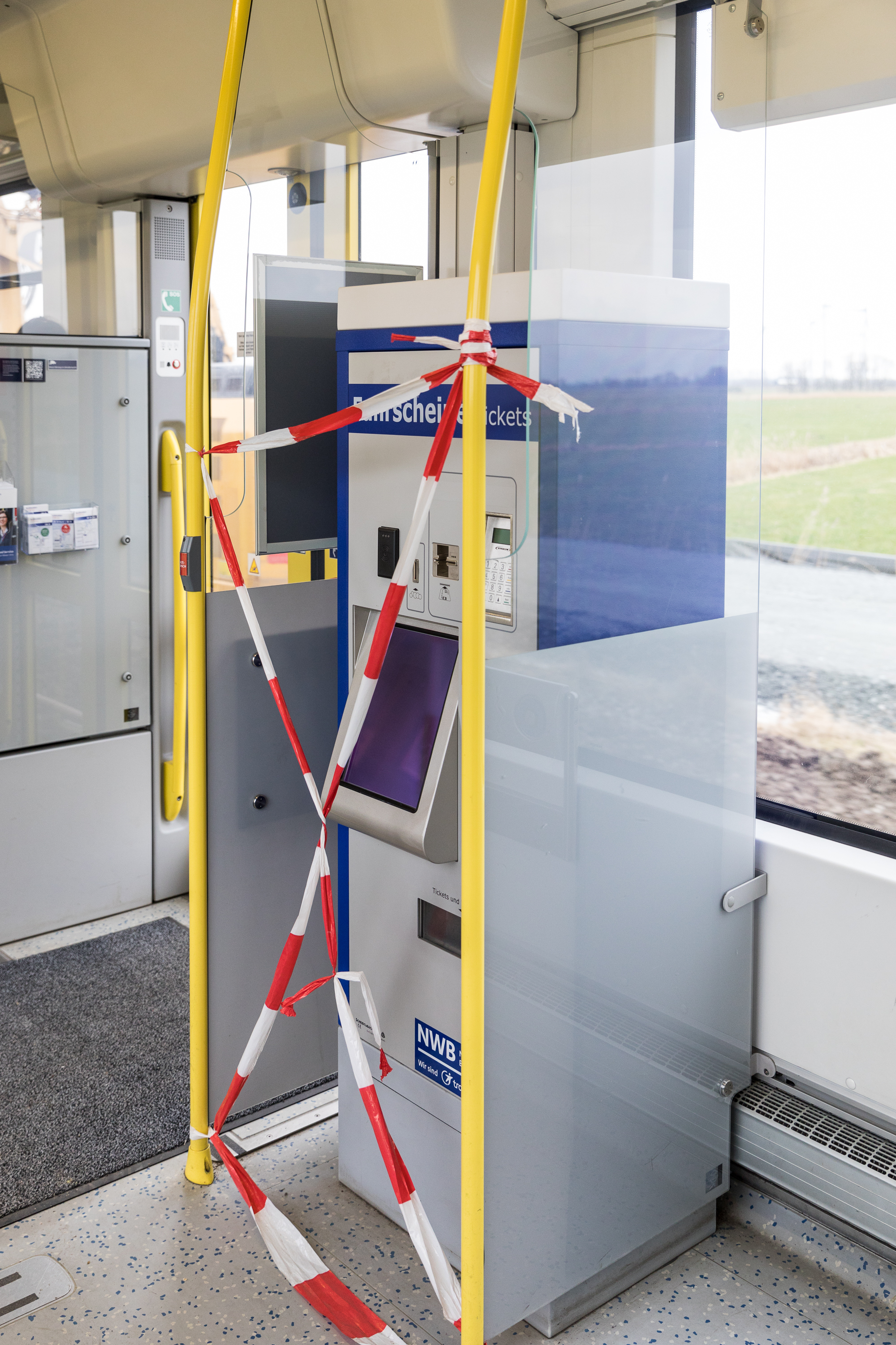 NWB-Fahrscheinautomat im Zug auf der Strecke Wilhelmshaven - Osnabrück: funktioniert, darf aber nicht mehr benutzt werden.....